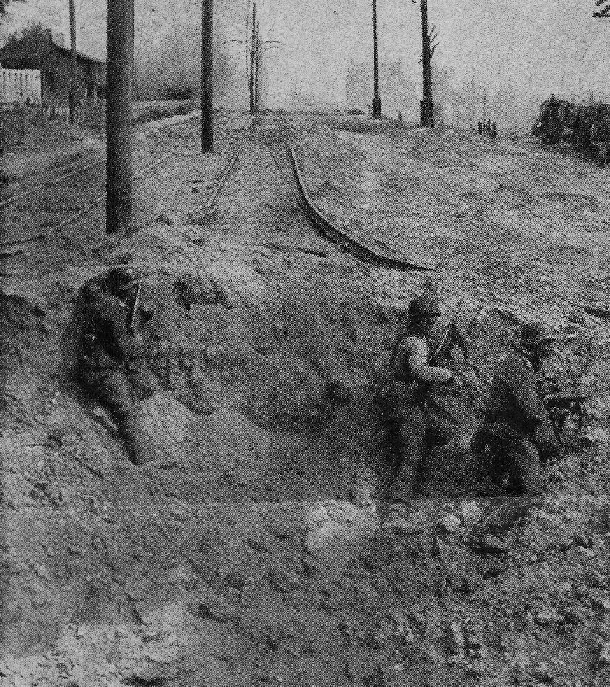 Soldati tedeschi della 24. Panzer-Division in azione nella stazione ferroviaria meridionale di Stalingrado il 15 settembre 1942